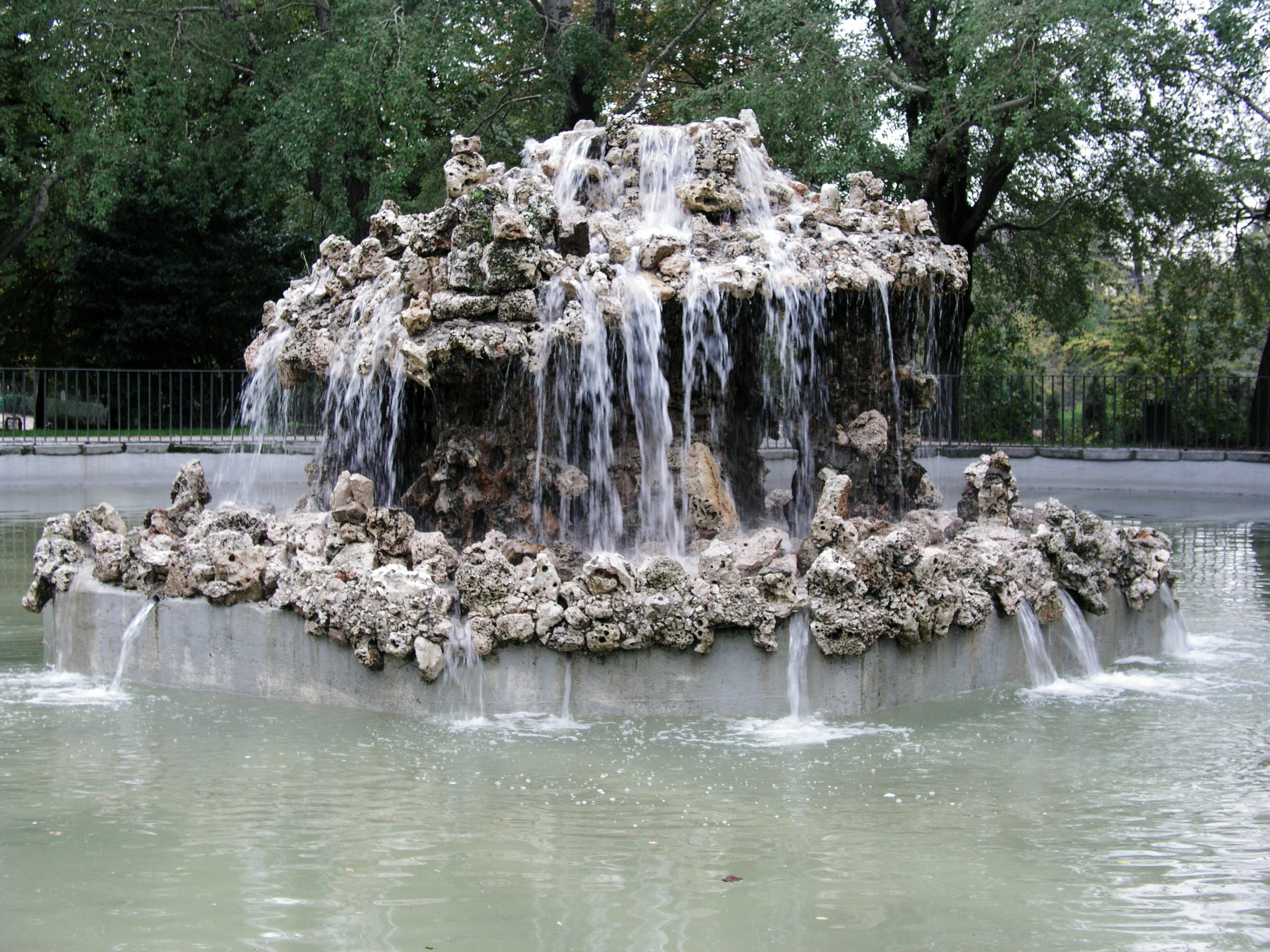 Jardines del Buen Retiro, Madrid, Spain. Estanque de las Campanillas.